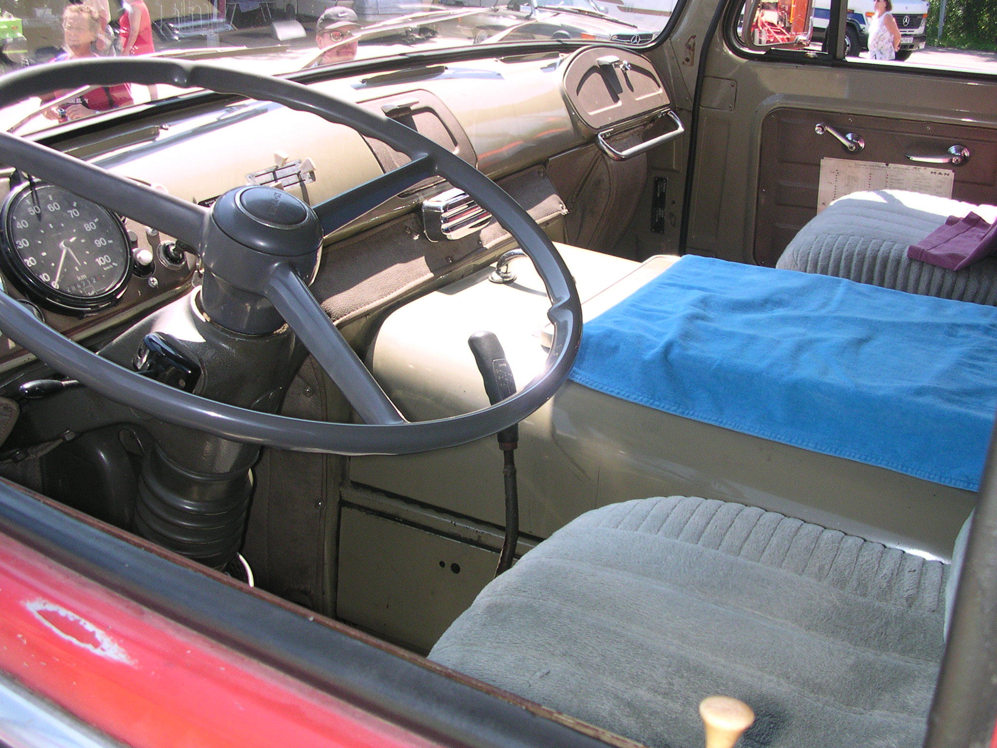 Nutzfahrzeug-IAA 2004 in Hannover. MAN 10212, Baujahr 1966, 157 KW, 212 PS